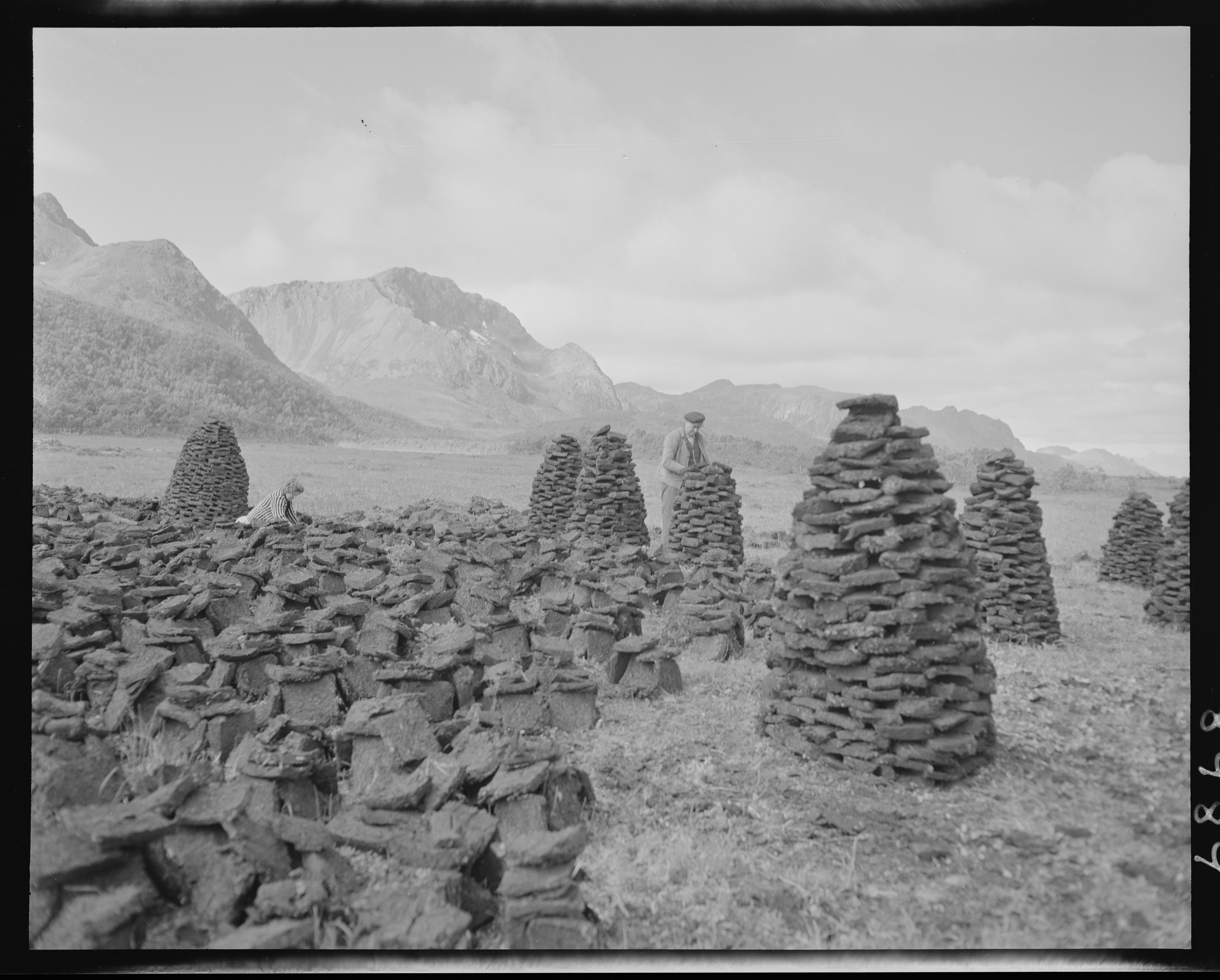 Bildet er hentet fra Nasjonalbibliotekets bildesamling. Anmerkninger til bildet var: Fotograf : ukjent Sortland, Nordland